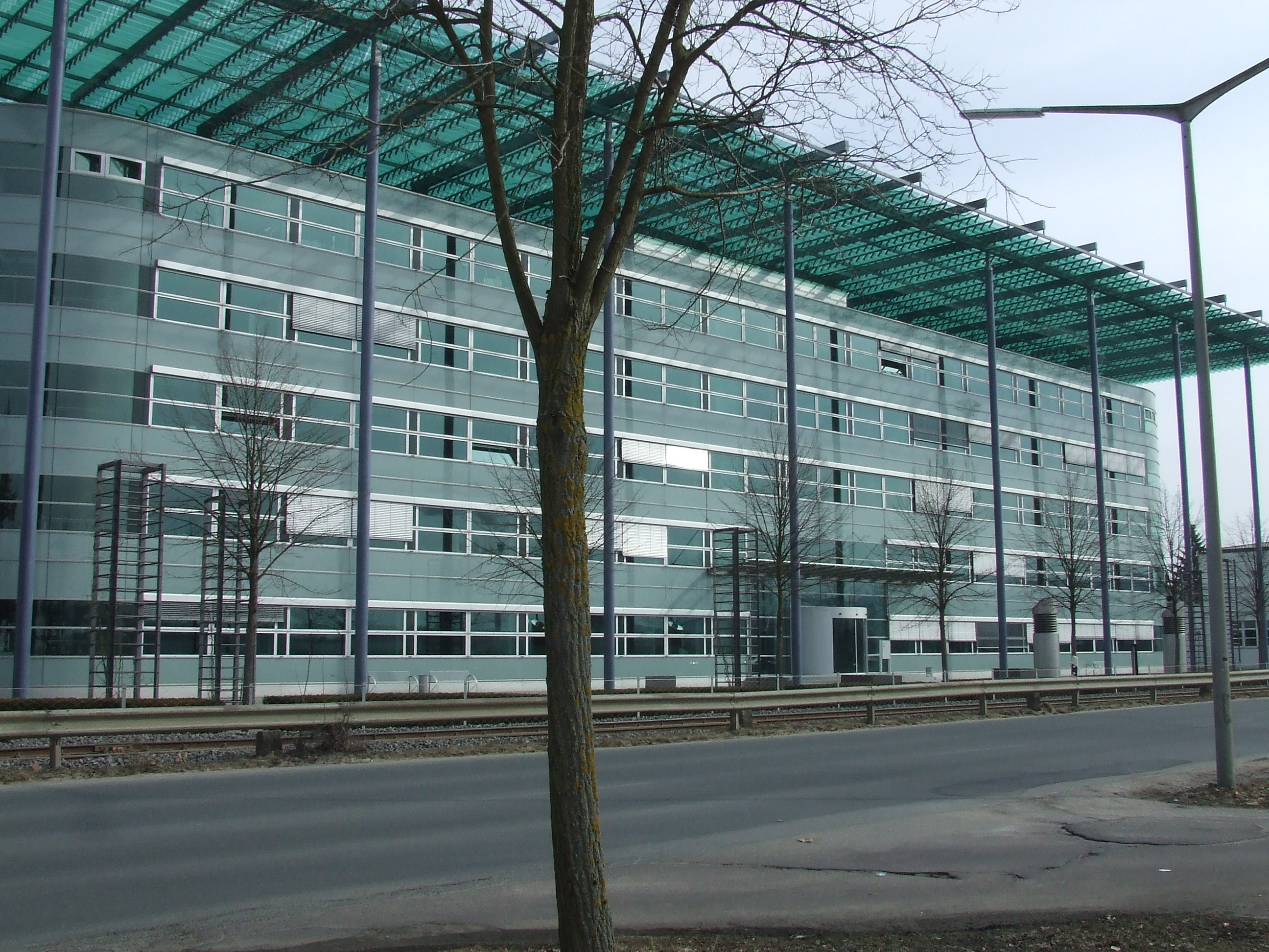 Stadt Neumarkt in der Oberpfalz, Hauptverwaltung der Pfleiderer AG Man beachte die in den Proportionen relativ langen und schlanken Stützen. Es handelt sich dabei um Schleuderbetonstützen, wie sie im Werk Neumarkt (direkt hinter dem Gebäude befinden sich die Hallen mit den Schleuderbänken) hergestellt werden!